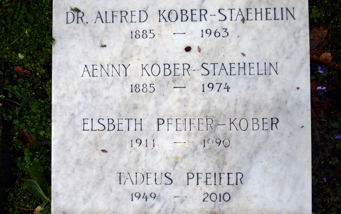 Alfred Kober-Stähelin (1885–1963) Dr.jur., Buchverleger, Journalist, Pazifist, Grab auf dem Friedhof Wolfgottesacker, Basel